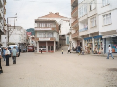 Güce